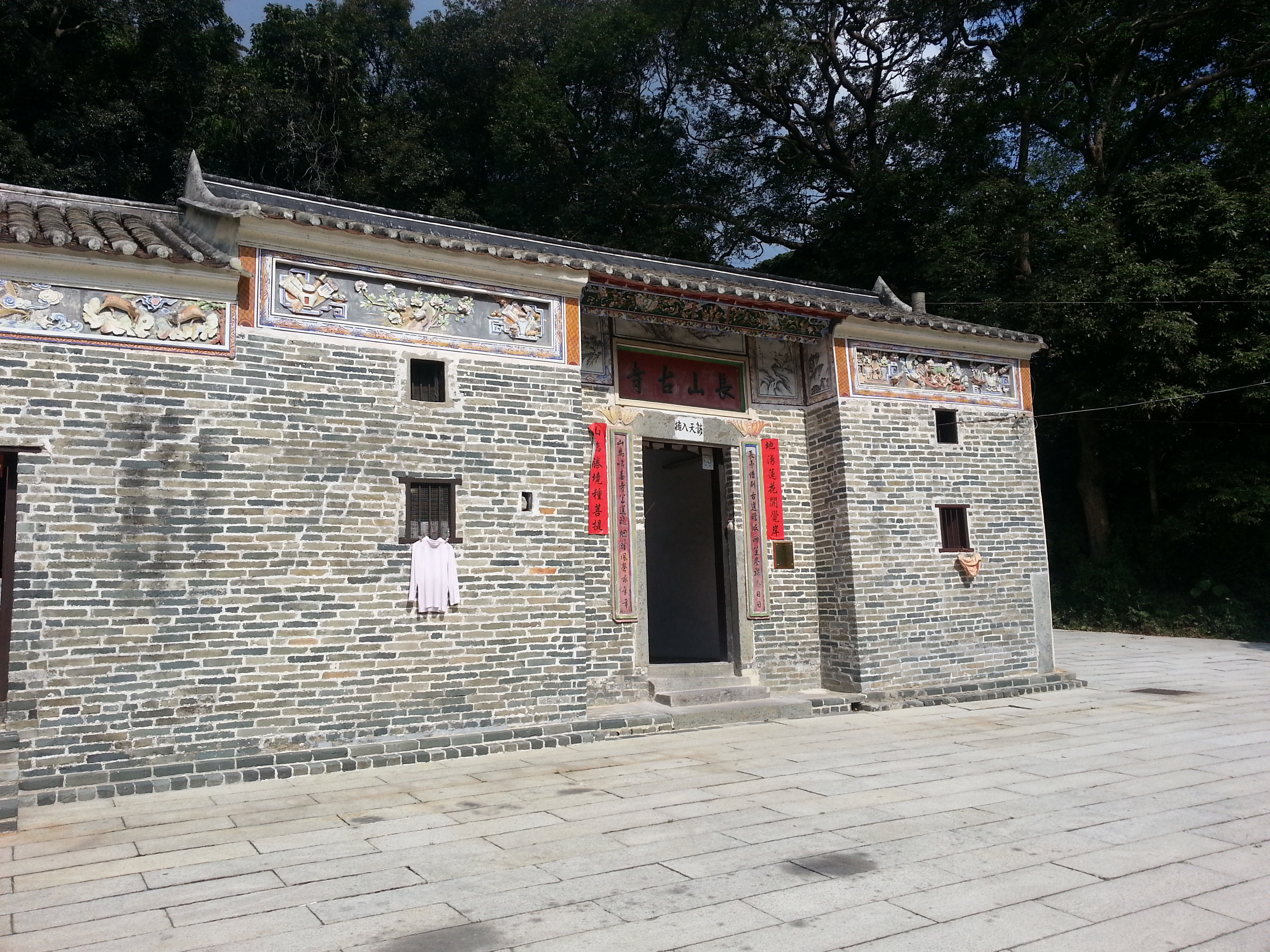 法定古蹟長山古寺